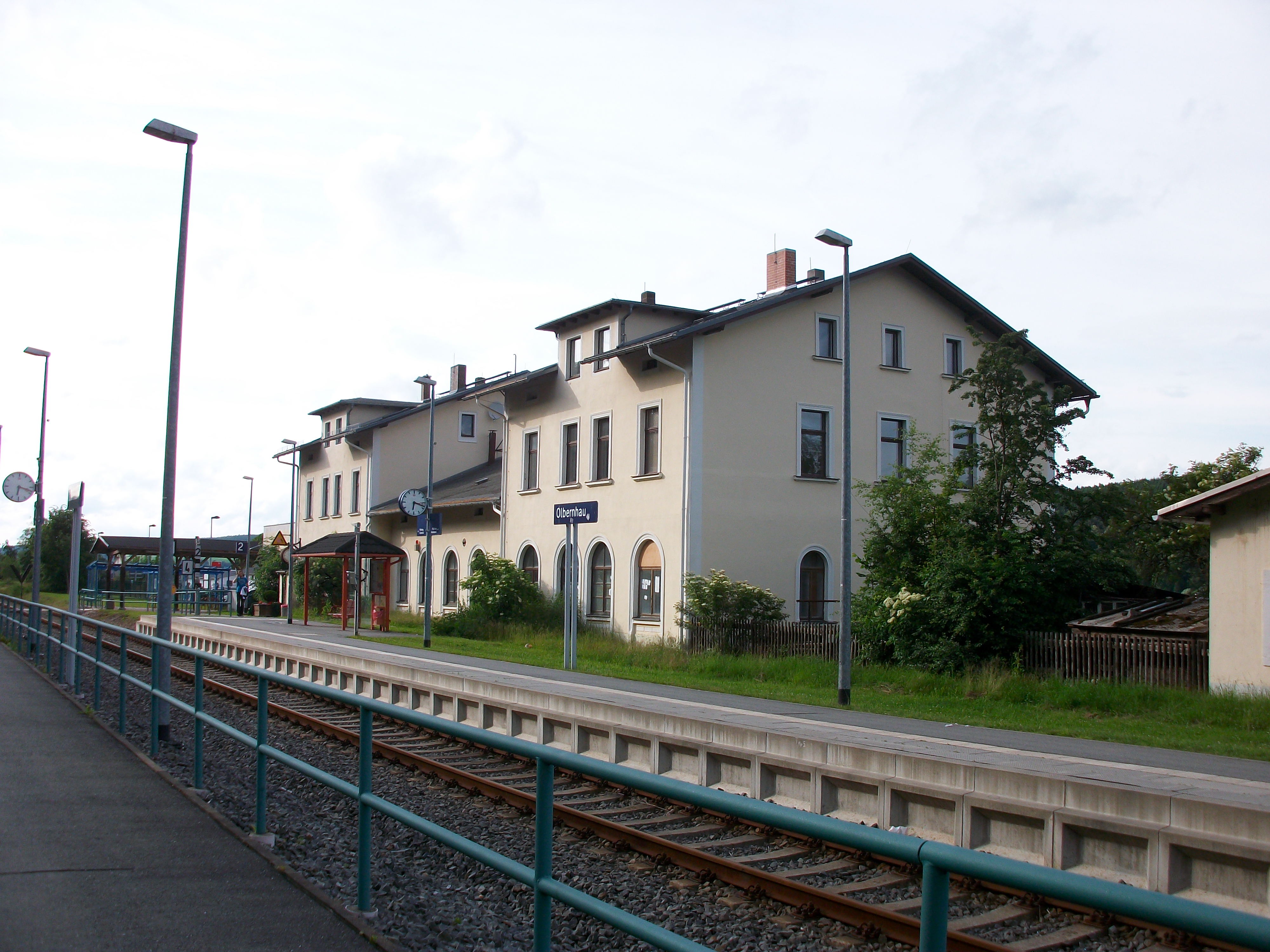 Bahnhof Olbernhau, Empfangsgebäude Gleisseite (2016)